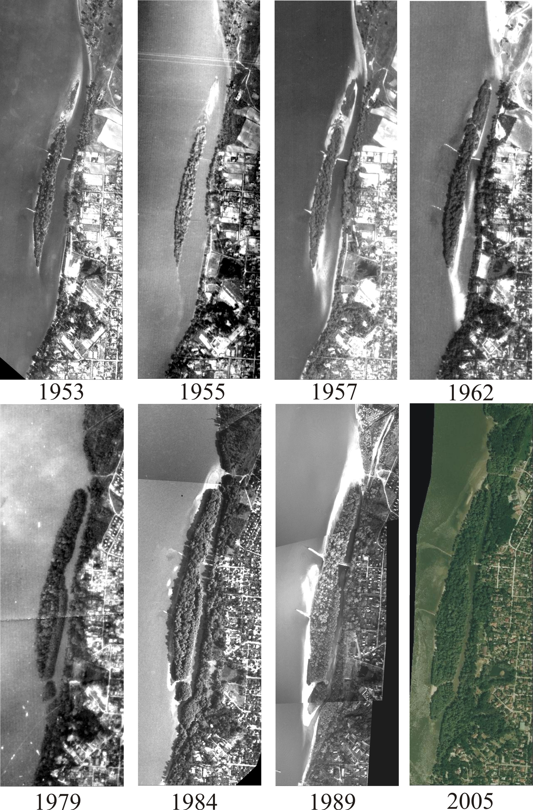 A Gödi-sziget fejlődése 1951-2005 között.